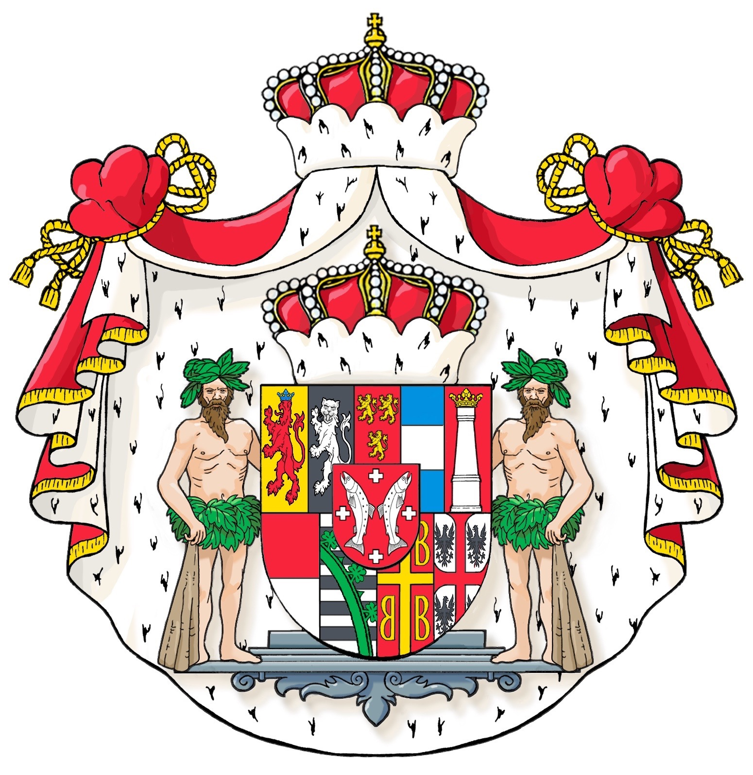 Wappen Fürst zu Salm und Salm-Salm